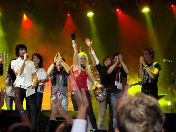 Виступ співачки Зоряна на конкурсі Свіжа кров